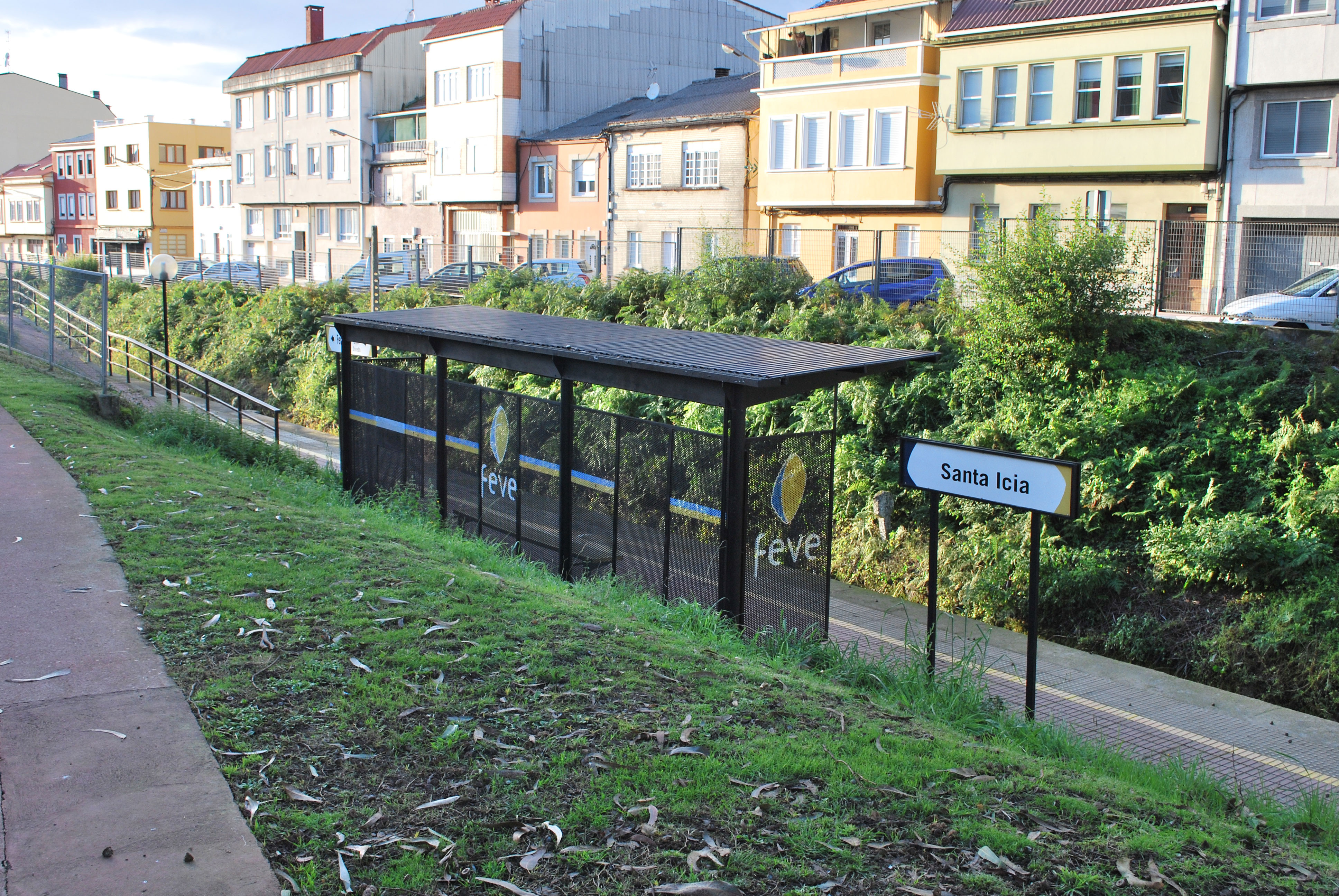 Vista do apeadoiro de Feve en Santa Icía, A Solaina Narón A Coruña Galiza